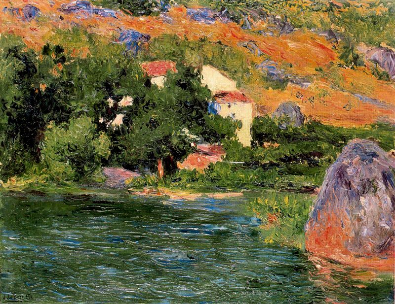 Pintura de paisajes y vistas